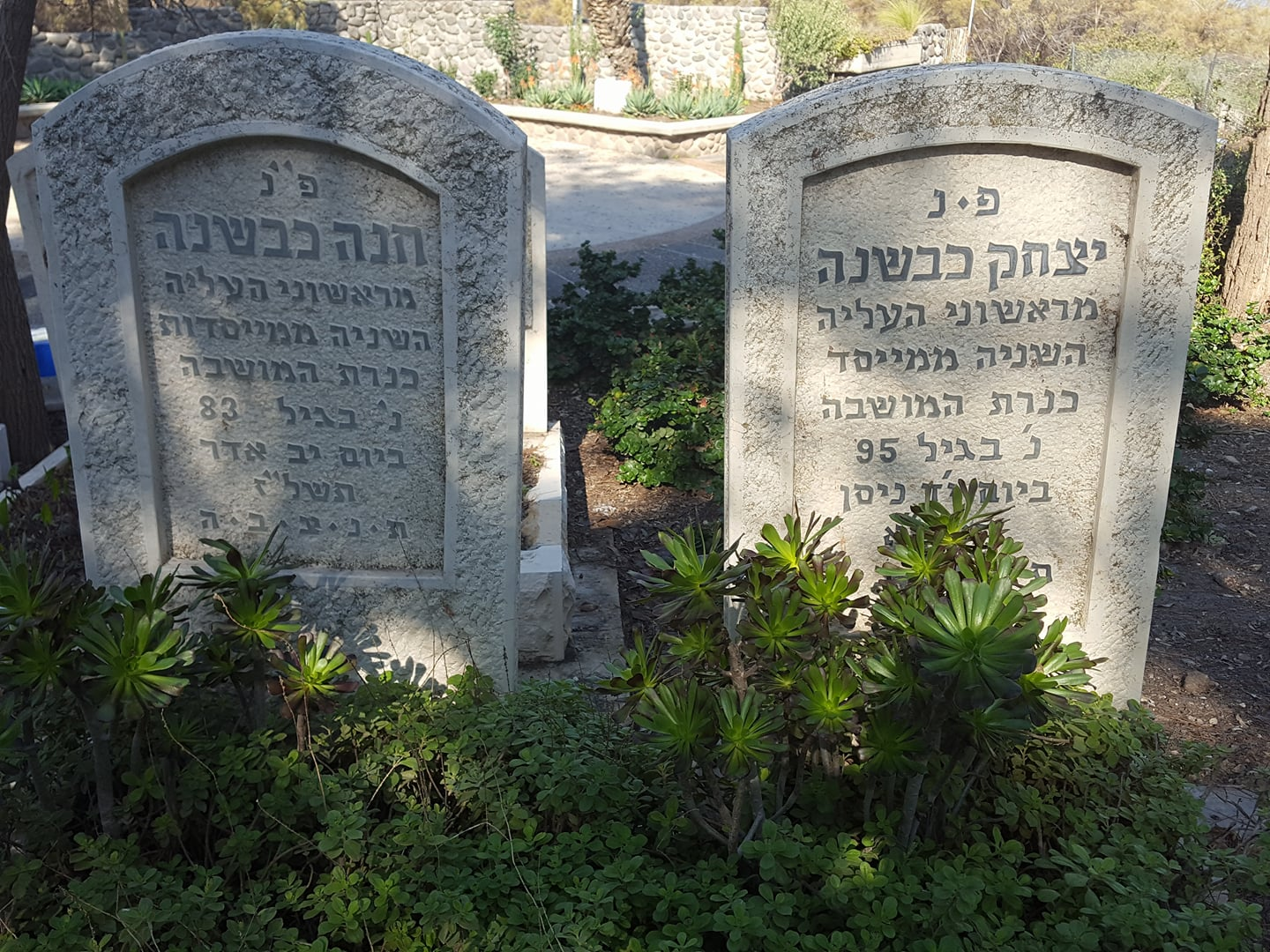 קברי יצחק כבשנה ורעיתו חנה מראשוני העליה השניה וממייסדי המושבה כנרת בבית הקברות כנרת .צילום אלי אלון